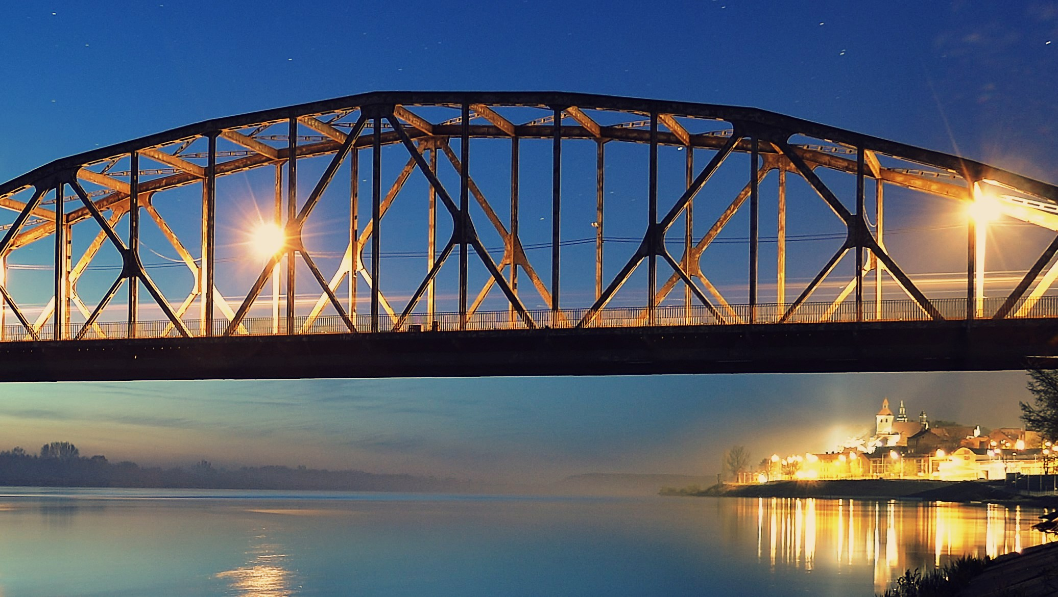 Most im. Bronisława Malinowskiego w Grudziądzu , Spichrza